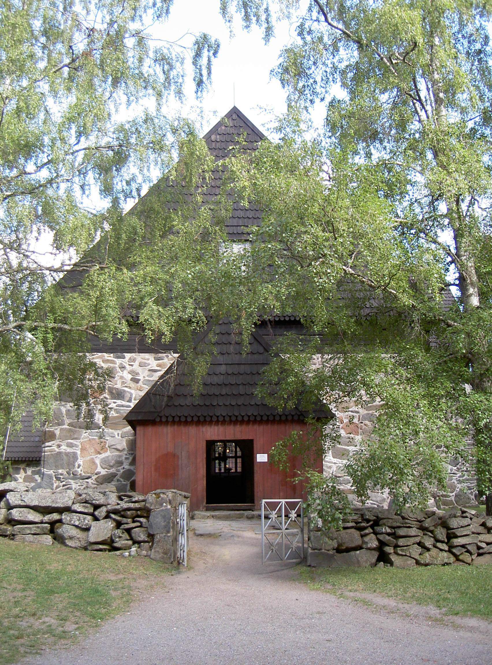 Old Church of Messukylä (Messukylän vanha kirkko) in Tamperen, Finland.